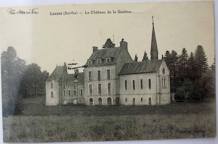 Chateau de La Gastine, sis sur la commune de Louzes (Sarthe). On distingue à gauche les deux bâtiments Renaissance, au centre le corps de logis 1900 (modifié dans les années 1950) et à droite la chapelle privée, datant du XIXe siècle.